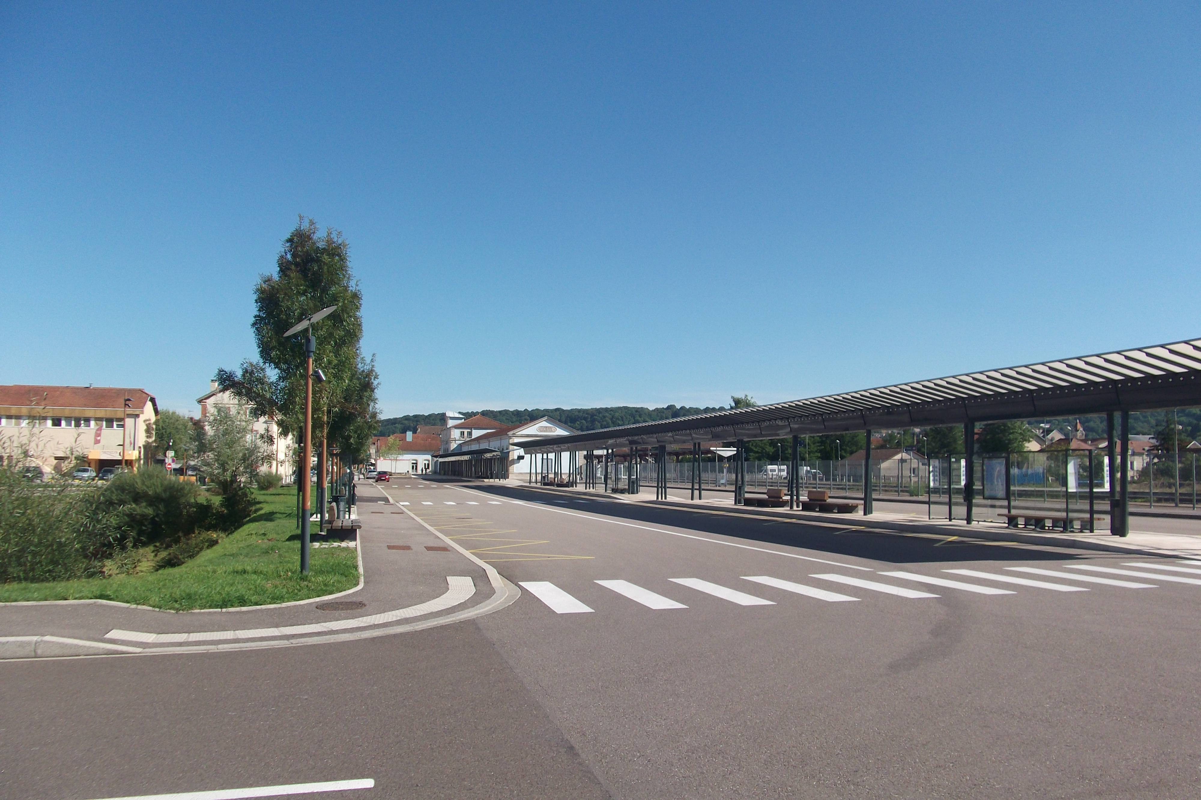 Le pôle multimodal de la gare de Vesoul (Haute-Saône)